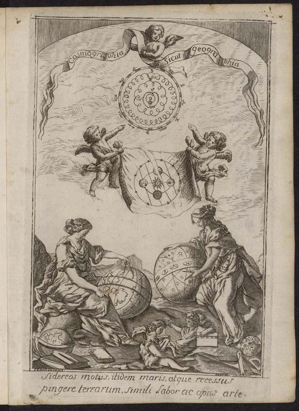 Brancas-Villeneuve, André-François de (17..-1758), “Cours complet de cosmographie, où le sistème de Copernic est réfuté ; le plan de l'univers exposé, & expliqué physiquement, sur des principes dictés par les expériences & les observations des principales académies des sciences. Par M. l'Abbé de B** BabordNum, consulté le 21 octobre 2018, Frontispice allégorique gr.s.c. Marque au titre, bandeaux , lettres ornées, cul-de-lampe, gr.s.b.. - Sig. 4 A2 B-3V4 3X3 Note sur la conservation - provenance : Cachet au titre: "Legs G. Lespiault Faculté des sciences" [cote FR 11352] Université de Bordeaux. Bibliothèque Sciences et Techniques. FR 11352